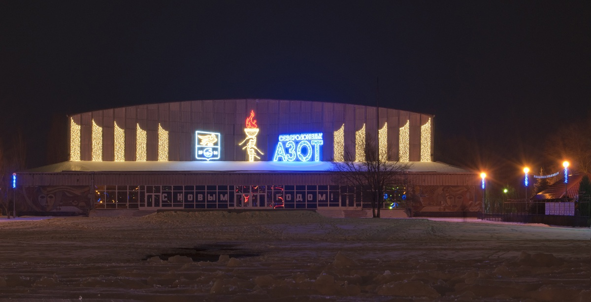 Ледовый дворец спорта